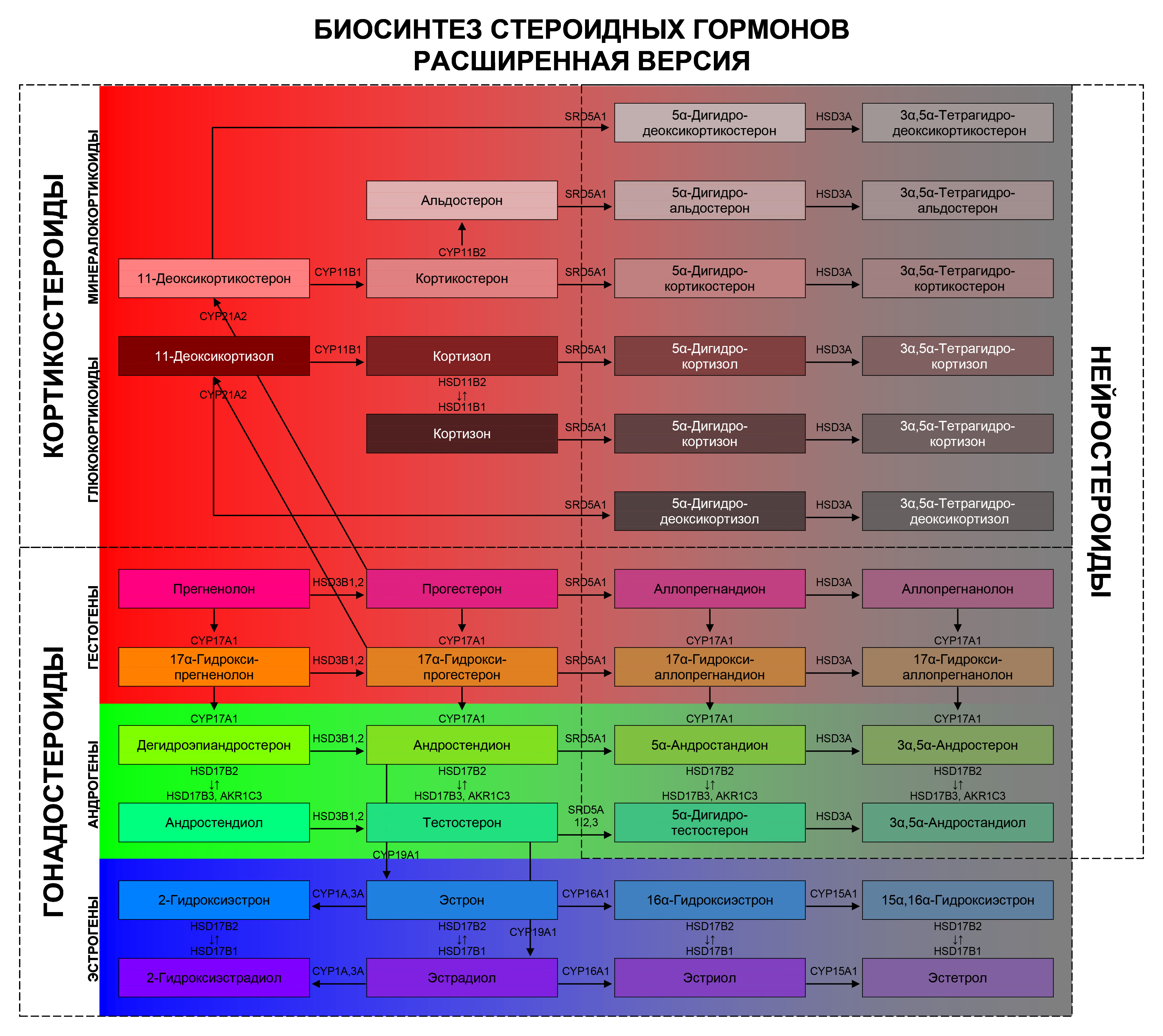 Расширенная версия стероидогенеза. Показаны группы стероидных гормонов с промежуточными метаболитами, а также ферменты, участвующие в метаболизме.